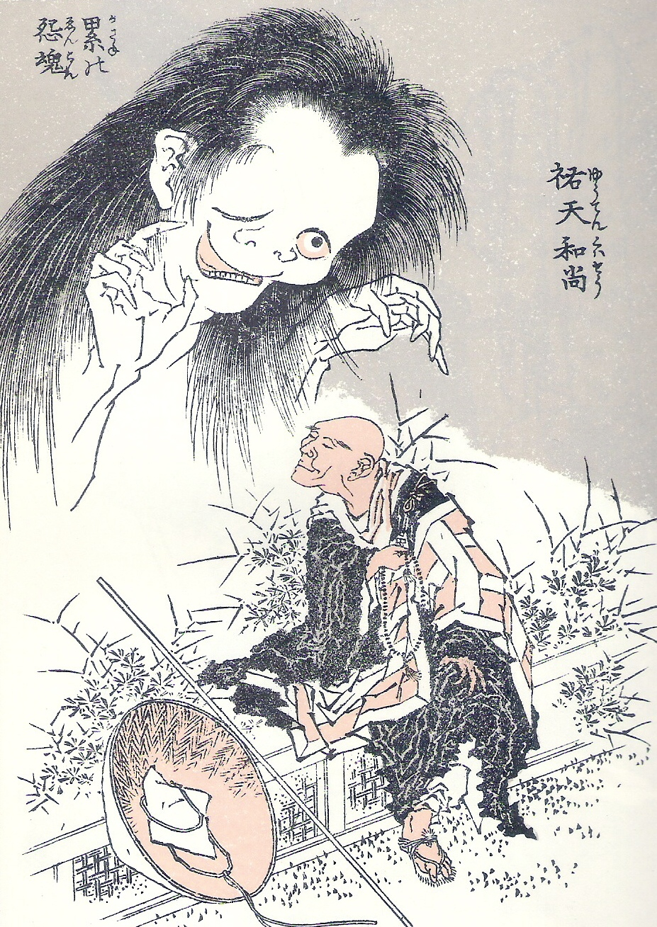 A page from Hokusai Manga